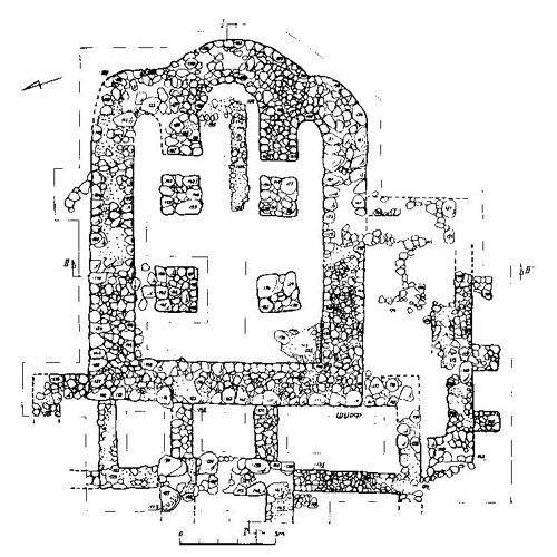 Фундаменты церкви Дмитрия Солунского. XVI в. План. Раскопки 1989 г. г. Гдов, Ансамбль Гдовского Кремля.